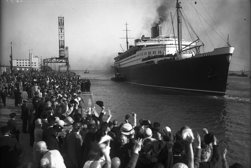 Die Jungfernreise des neuen deutschen Riesendampfers "Bremen" in Bremerhaven fand unter dem Jubel von zehntausenden von Zuschauern statt. Der Ozeanriese "Bremen" tritt unter dem Jubel der Bevölkerung seine Jungfernreise von Bremerhaven nach New York an.